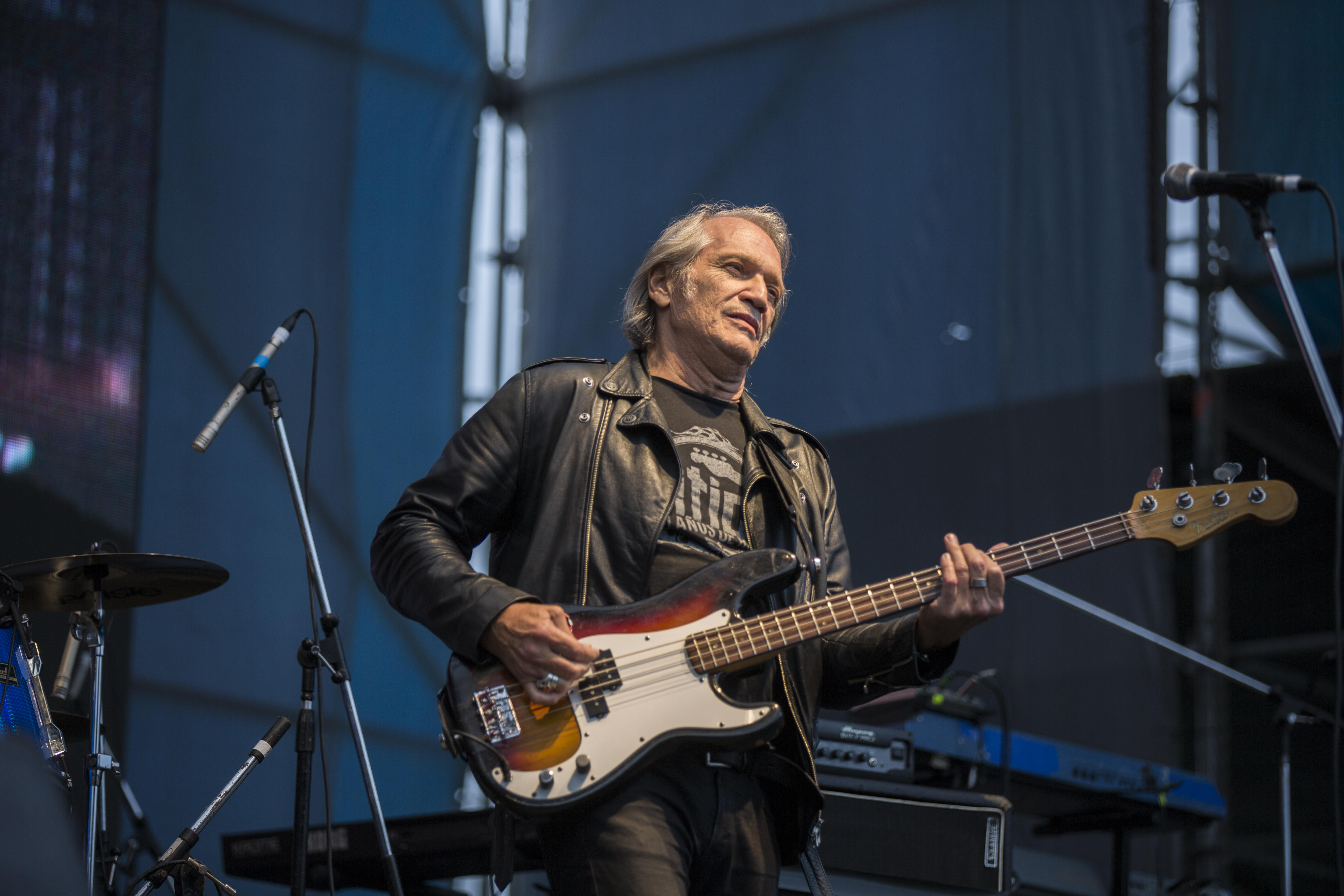 El músico Vitico en vivo (2017).